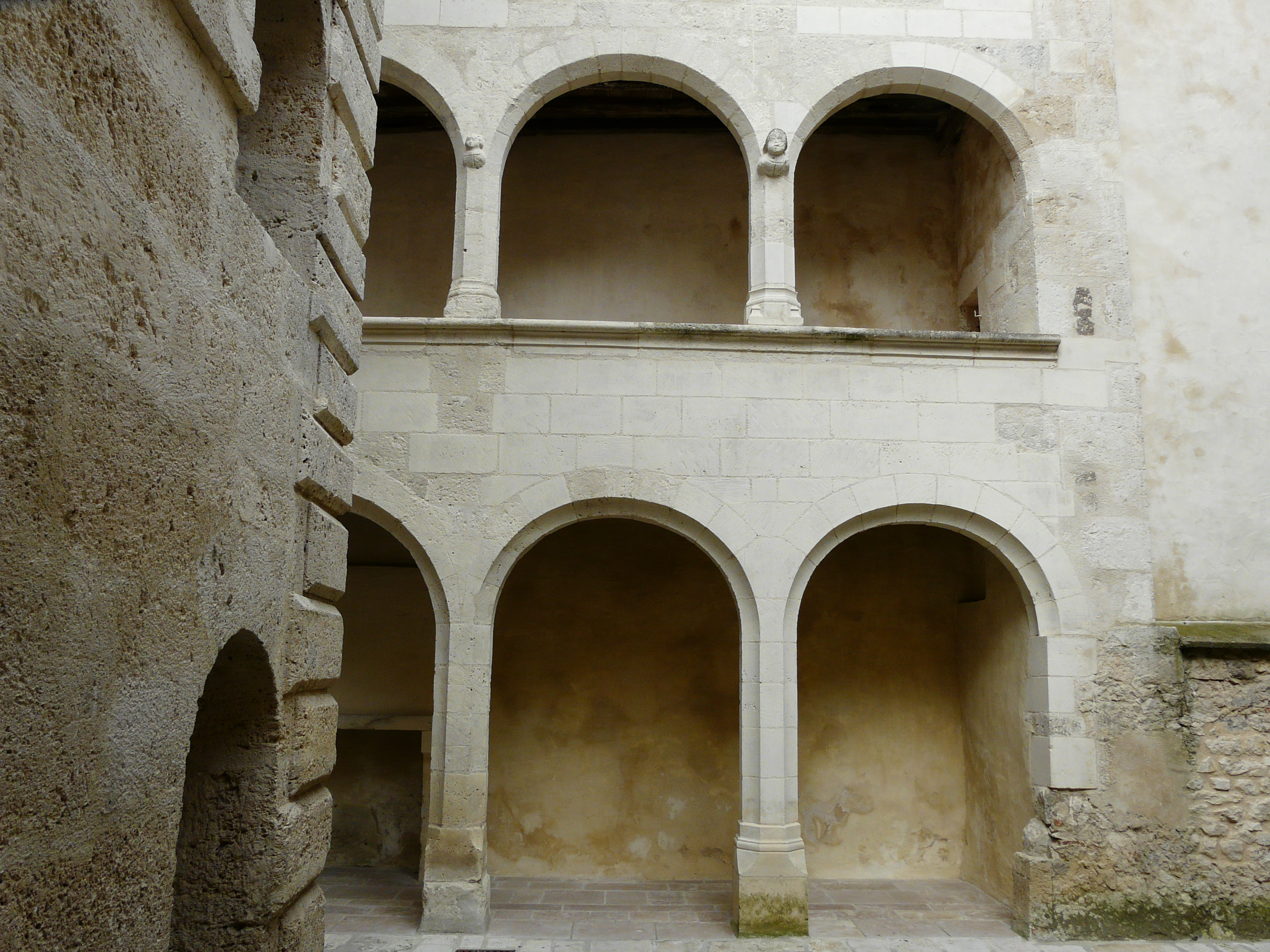 La cour de la maison des Conférences, côté rue des Conférences, Nérac, Lot-et-Garonne, France.